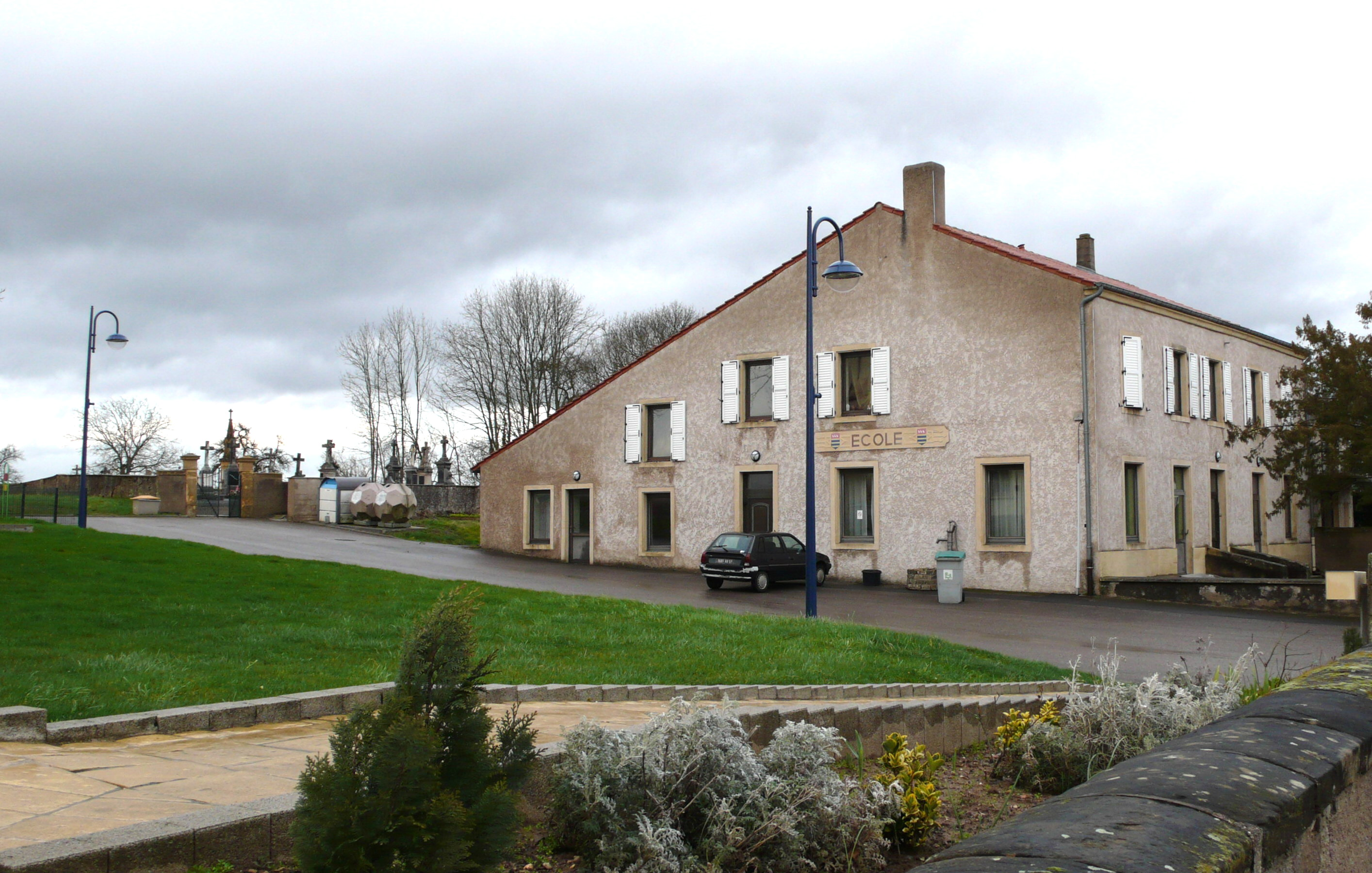 D'Schoul vun Evrange.